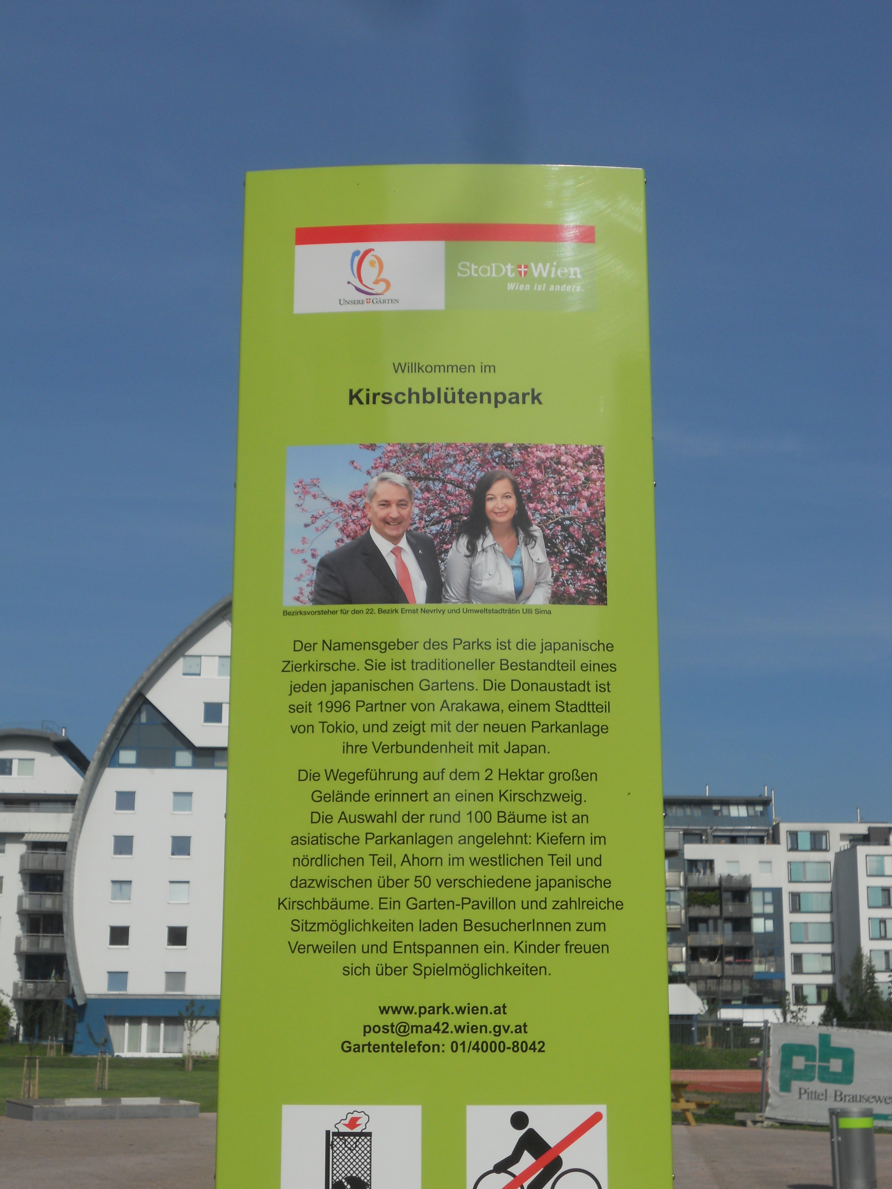 Erklärungstafel zum 2015 neu angelegten Teil des Kirschblütenparks